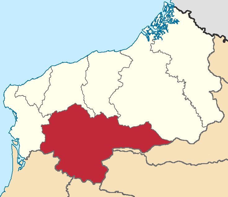 Mapa localizacor del cantón Quinindé, Esmeraldas, Ecuador